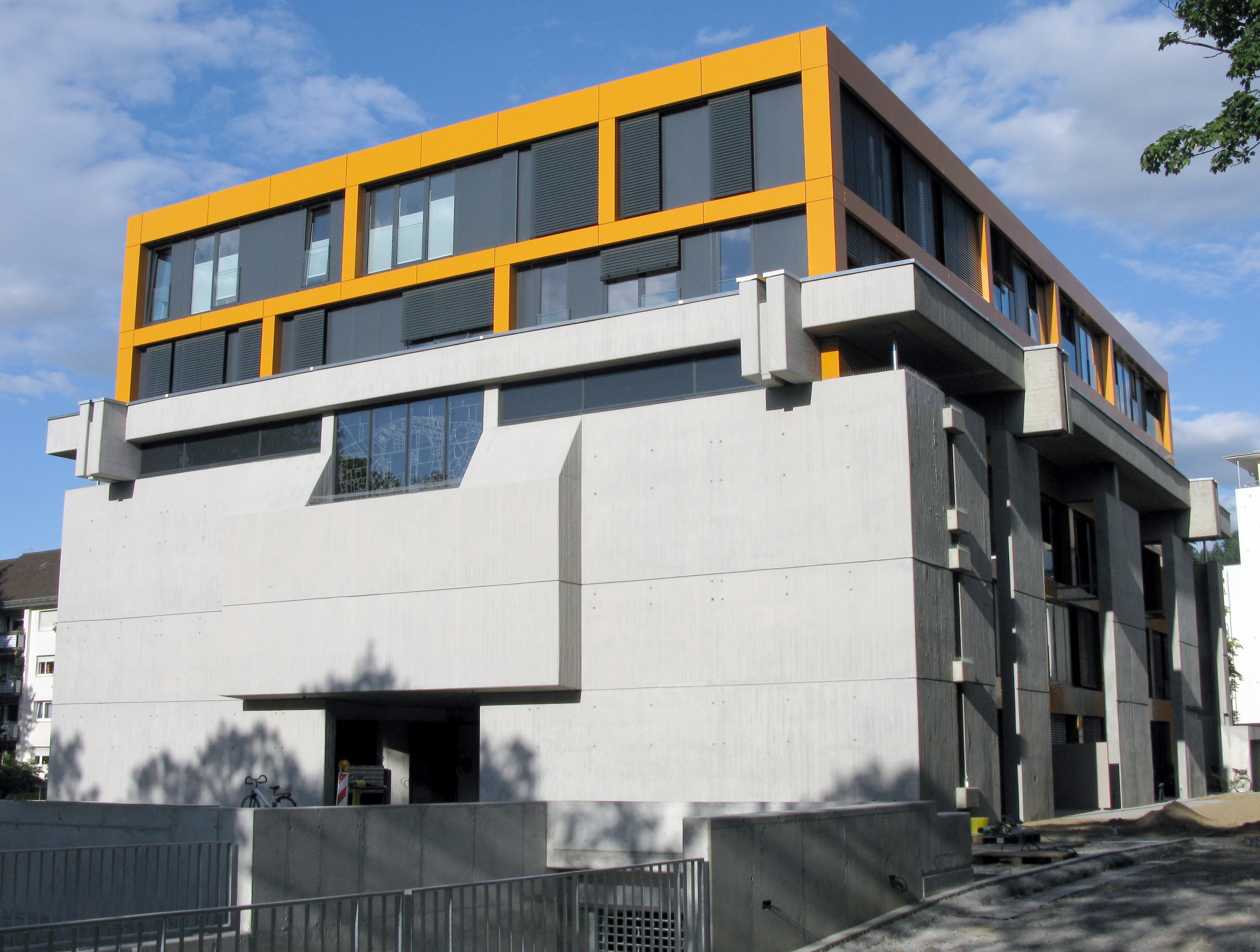 zu Wohnungen umgebaute Kirche St. Elisabeth in Freiburg